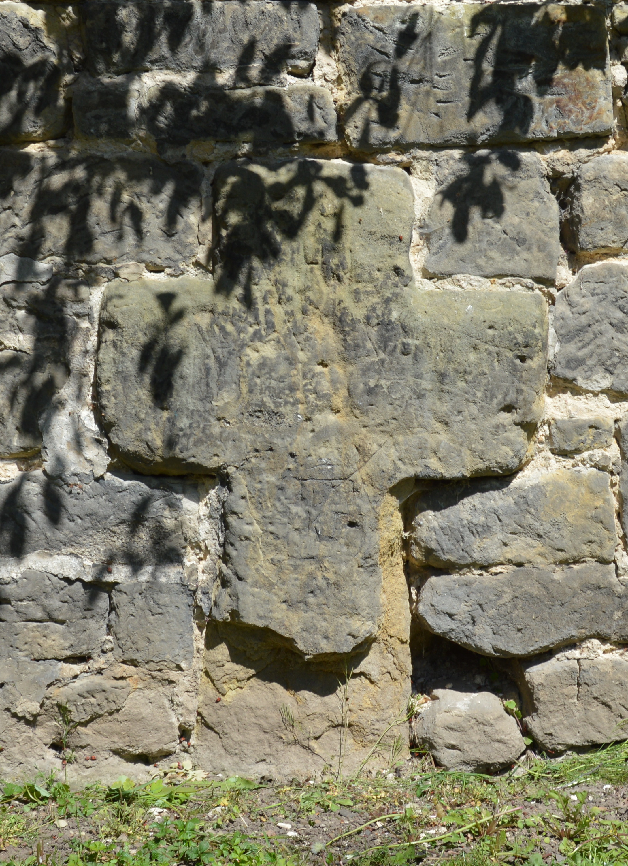 Kreuz Adelheidstraße 26 Quedlinburg